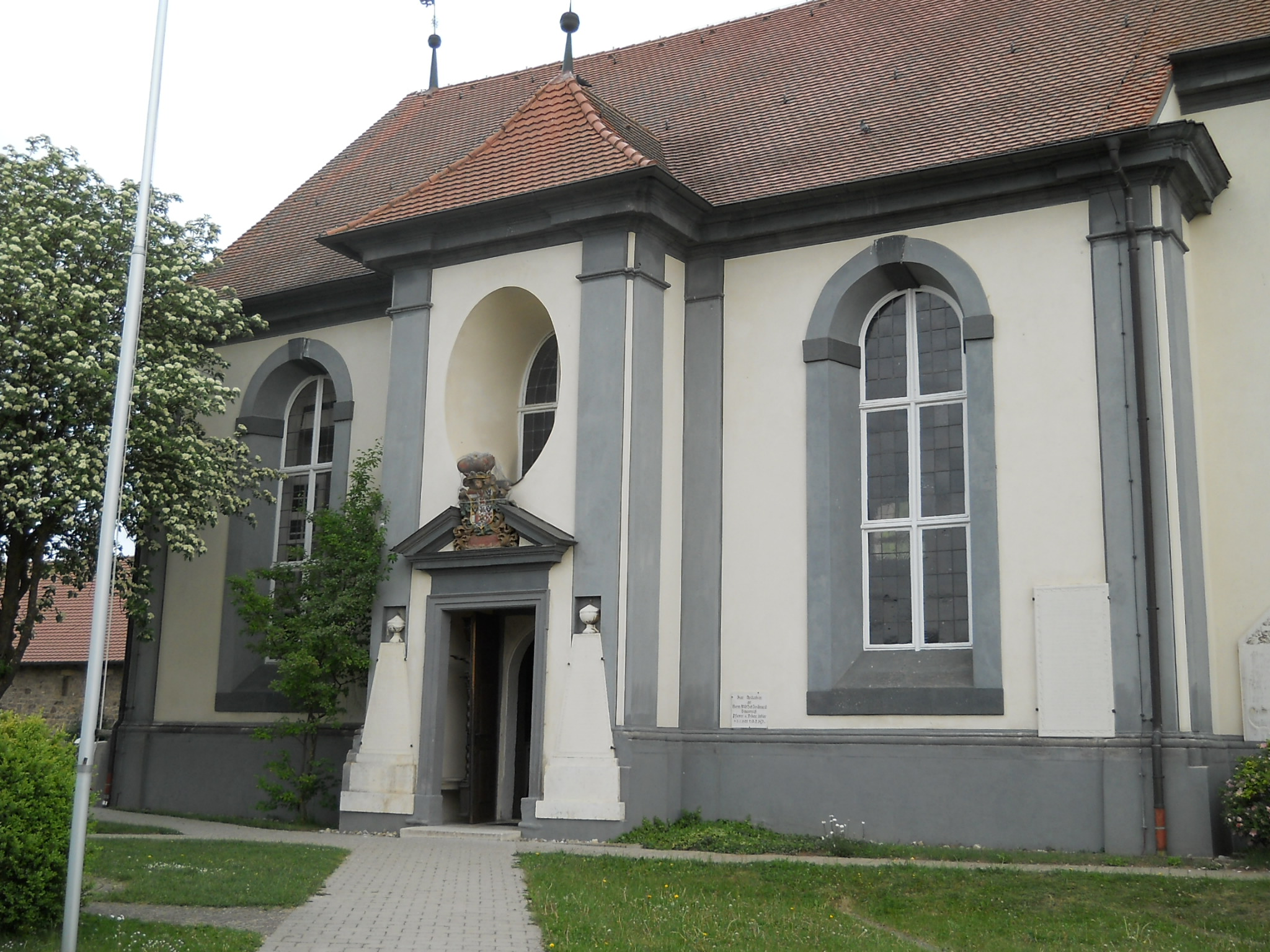 Dittenheim, Gemeinde im mittelfränkischen Landkreis Weißenburg-Gunzenhausen (Bayern), evang.-luth. Pfarrkirche St. Peter und Paul, Südfront mit Portalvorbau am mittleren Joch